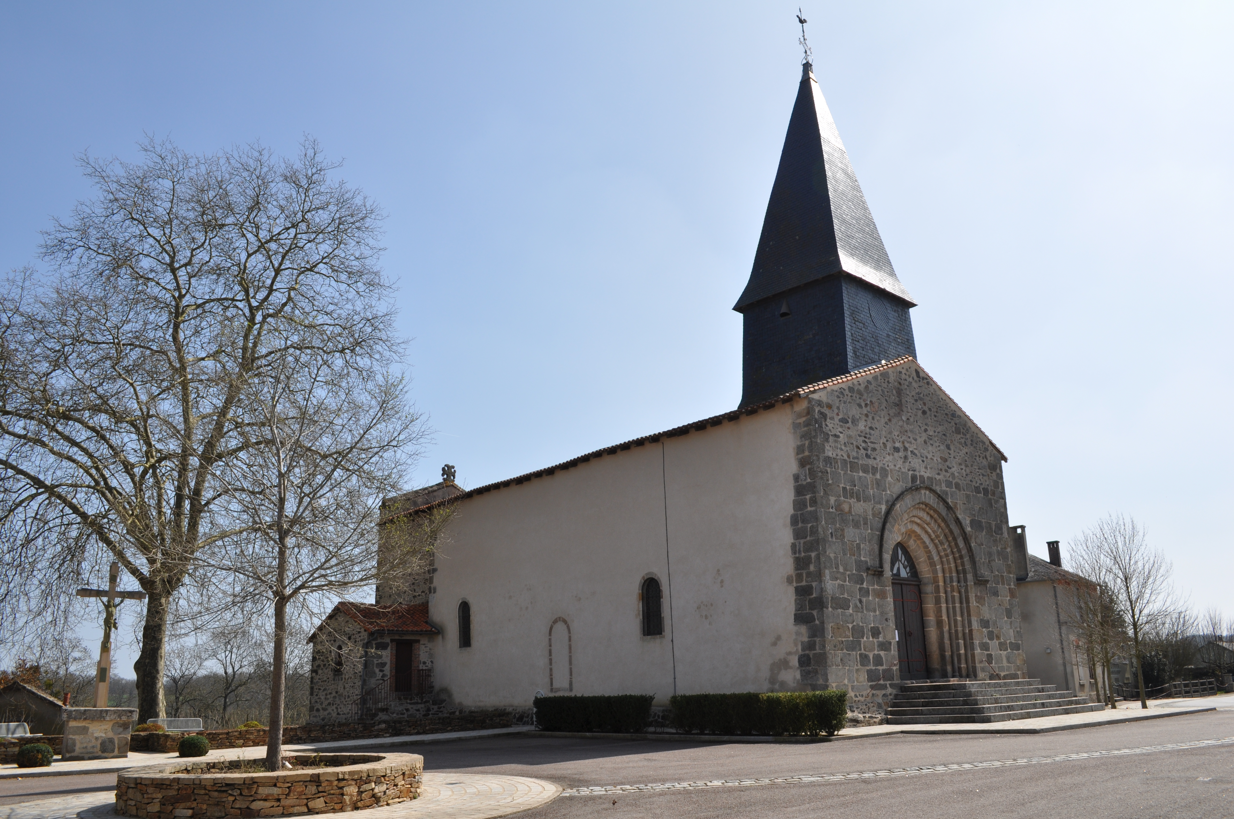 L'église de Saint-Barbant